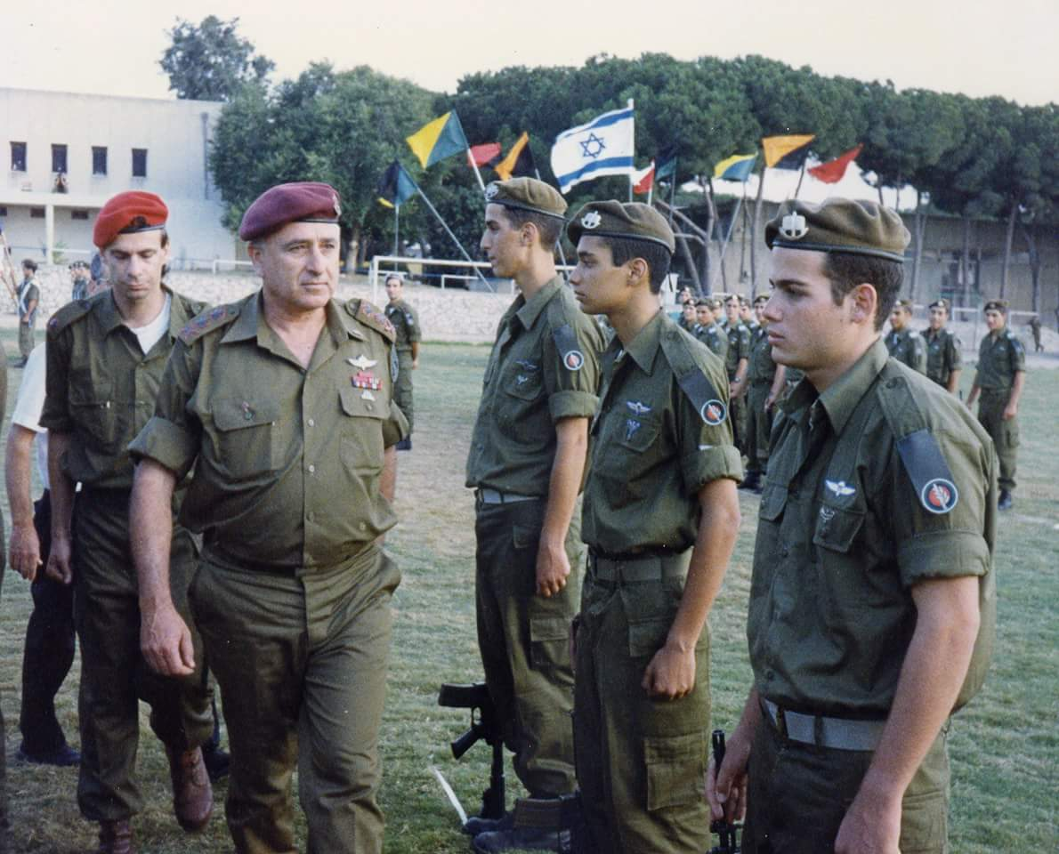 רא״ל אמנון ליפקין-שחק ז״ל, בוגר הפנימייה הצבאית בחיפה בטקס סיום מחזור מ״א בפנימייה הצבאית בחיפה, 1995